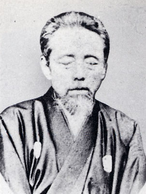 山本覚馬 (1828-1892)